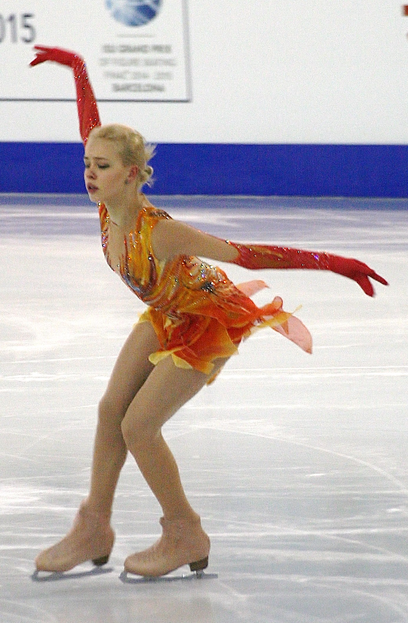 Анна Погорилая (Россия) на финале Гран-при по фигурному катанию 2014-2015.